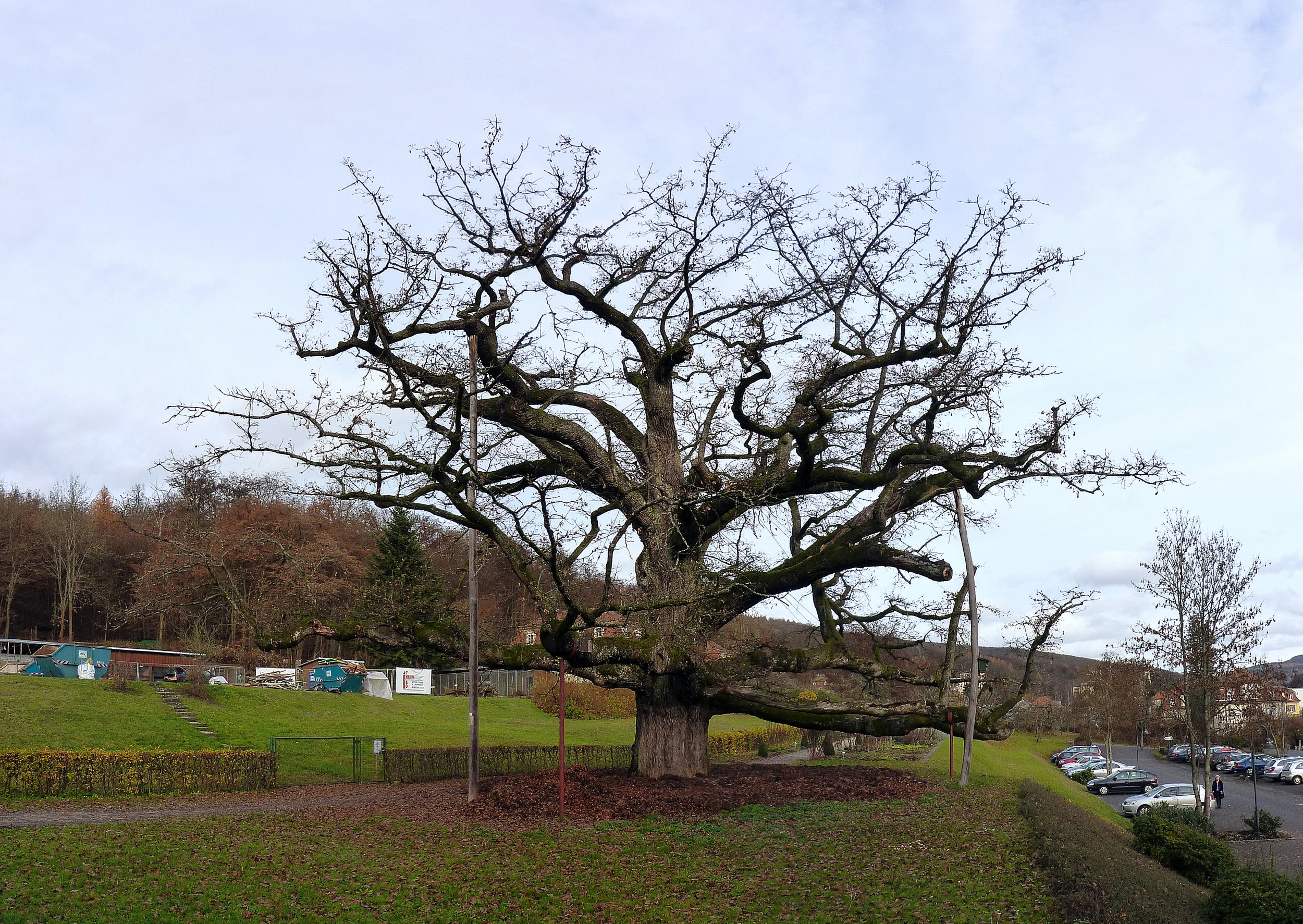 König-Ludwig-Eiche